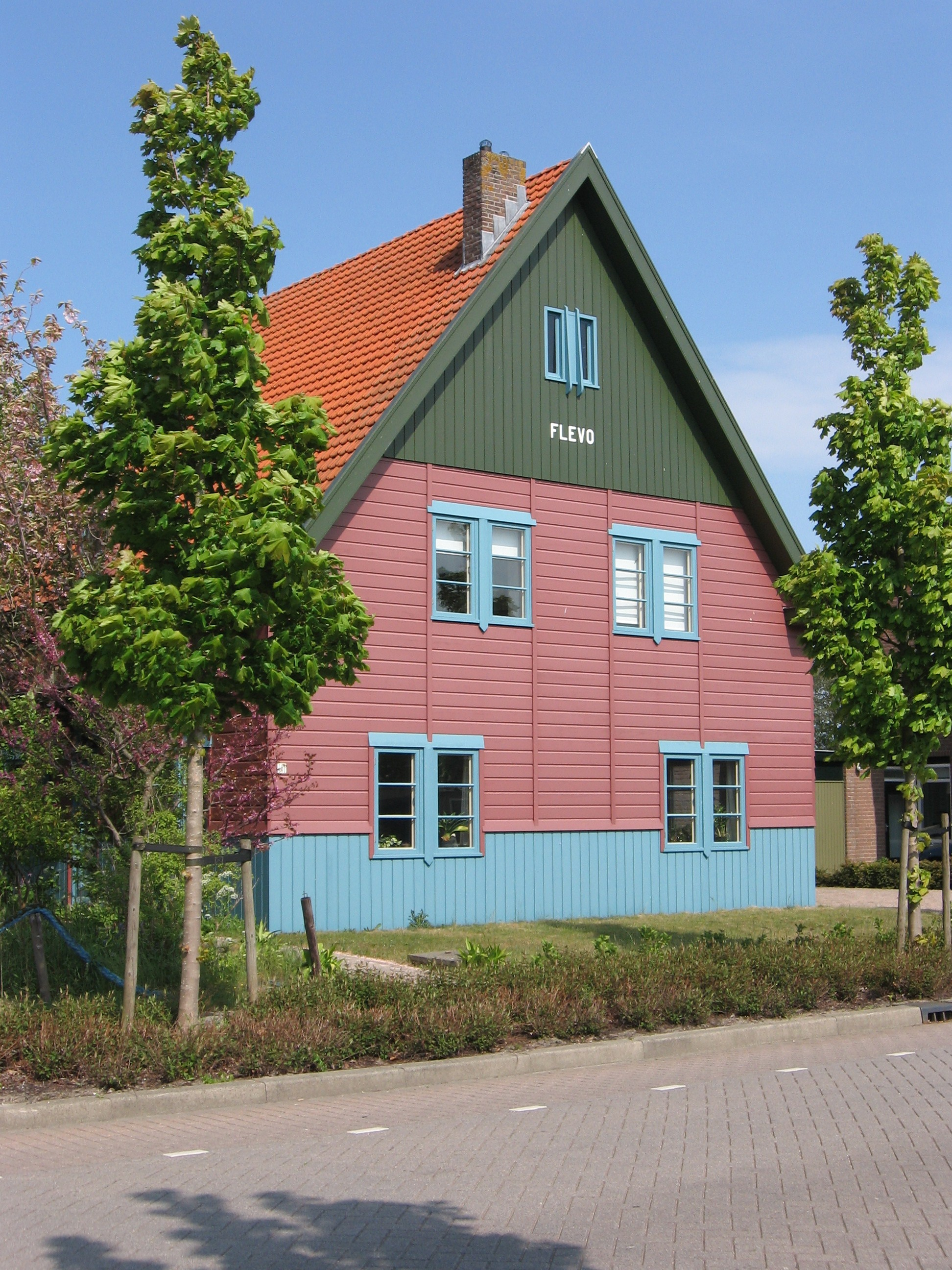 Den Burg - Schilderend 101.jpg